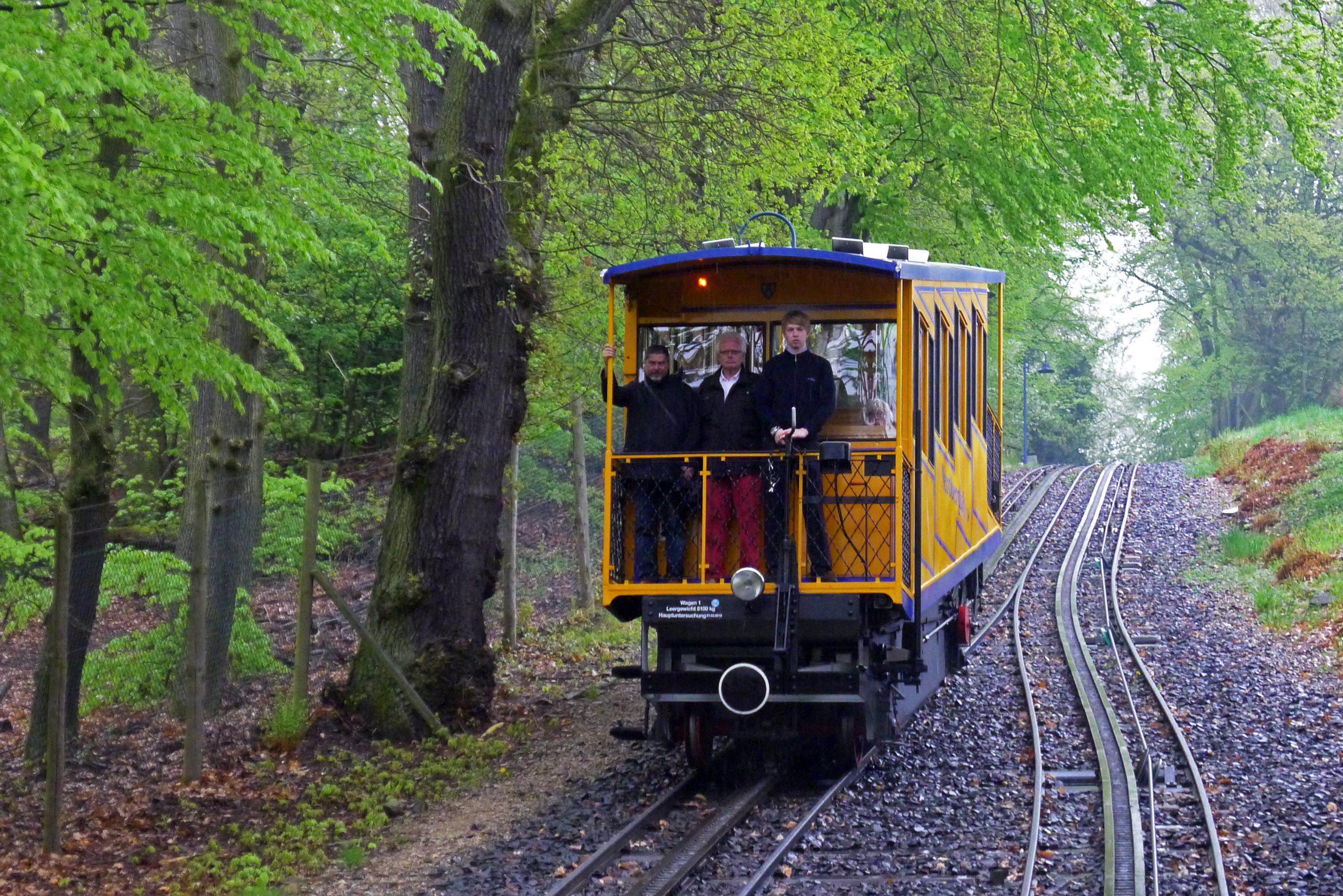 Nerobergbahn